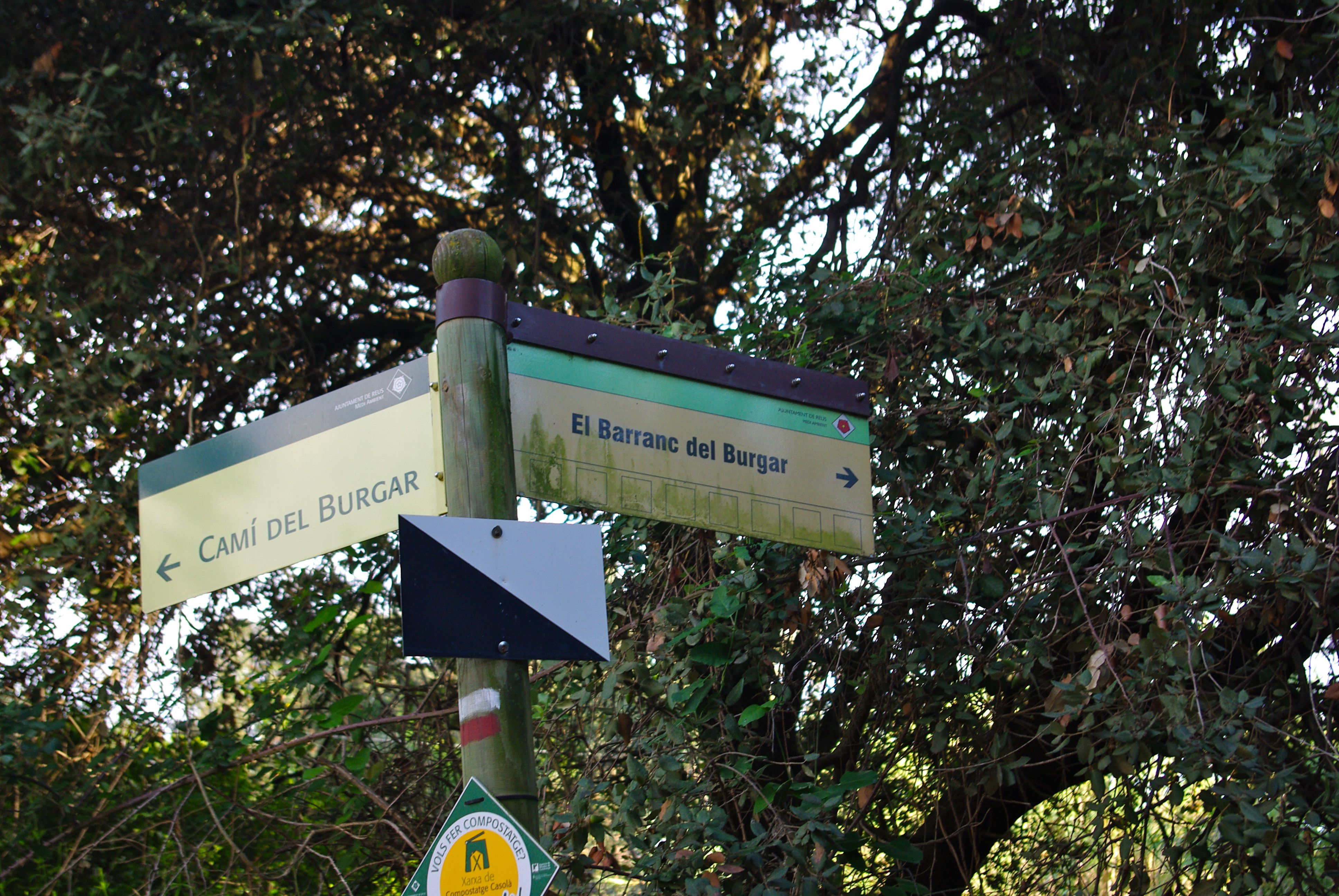 El barranc del Burgar on s'encreua amb el camí del Burgar